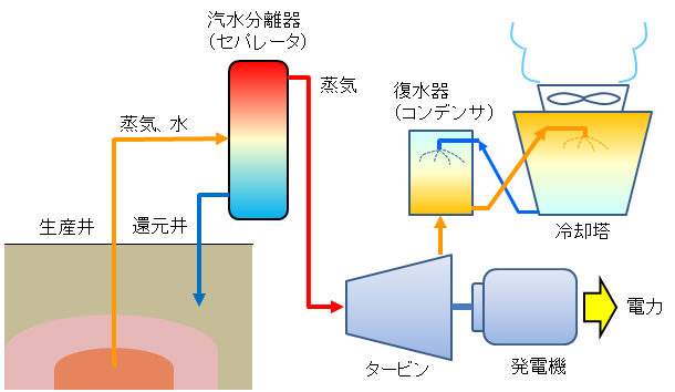 復水式地熱発電設備（シングルフラッシュサイクル）の概略図（参考：地熱学会、地熱エネルギー入門（翻訳）地熱資源の利用）